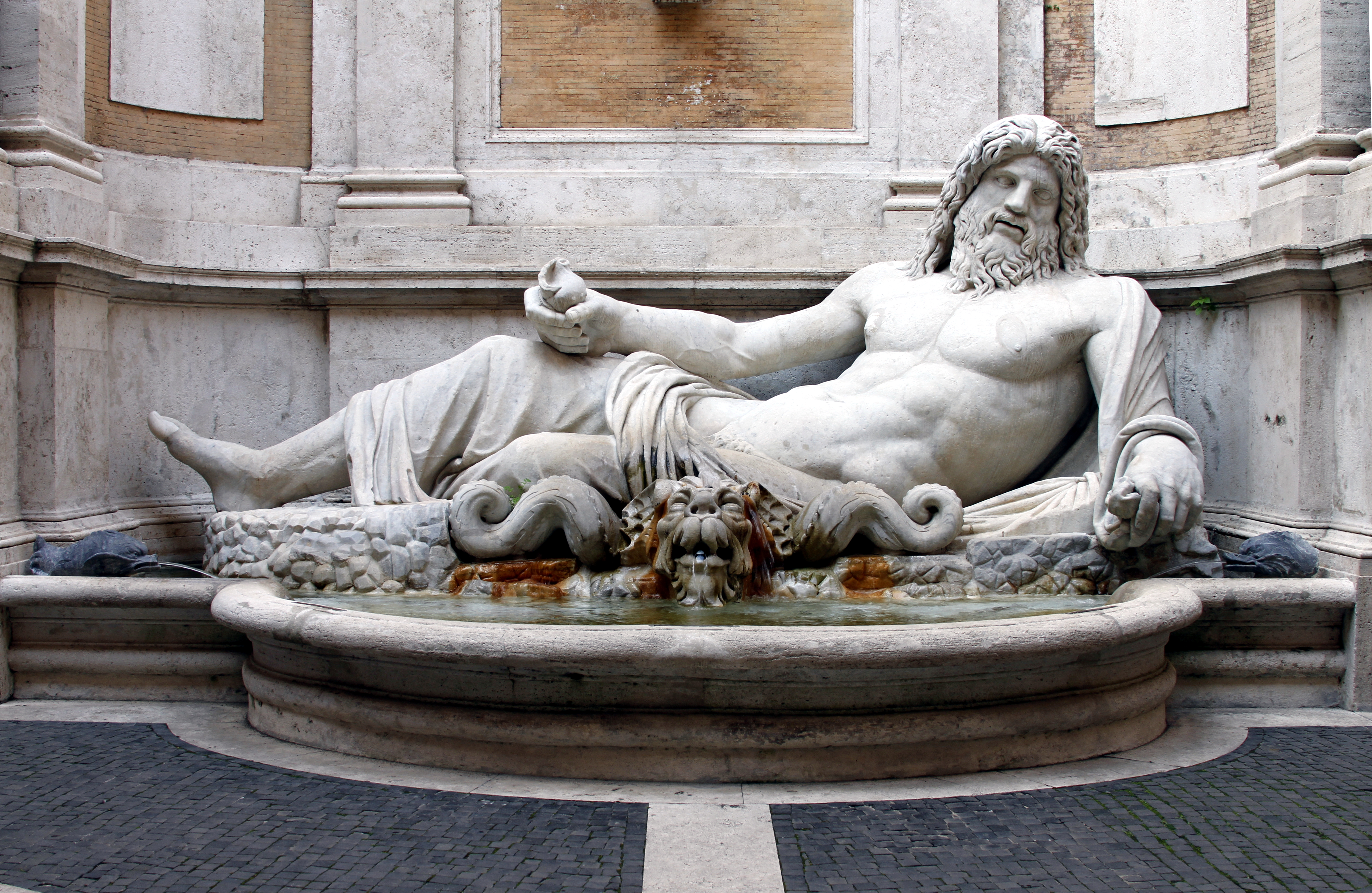 Palazzo Nuovo - Musei Capitolini - Rome